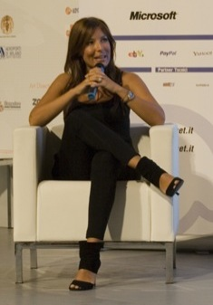 Selvaggia Lucarelli durante l'intervento di Codice Internet a Milano Ottagono.